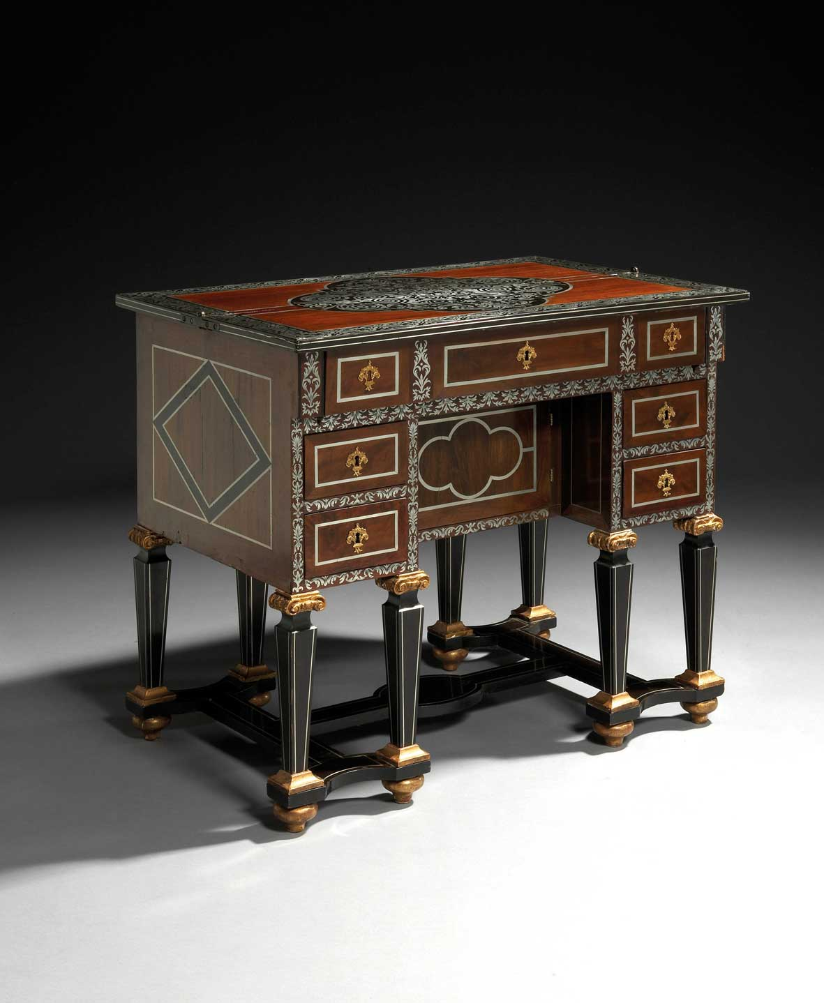 Cabinet / bureau d'époque Louis XIV dit Cabinet / bureau Mazarin. - Bureau Mazarin reposant sur huit pieds en gaine reliés par une entretoise en forme de "H", muni en partie basse de deux caissons latéraux à deux tiroirs chacun, encadrant un caisson central plus large et en retrait. Ce dernier est couronné d'une étroite ceinture à trois tiroirs qui surmonte un guichet ouvrant par un abattant.